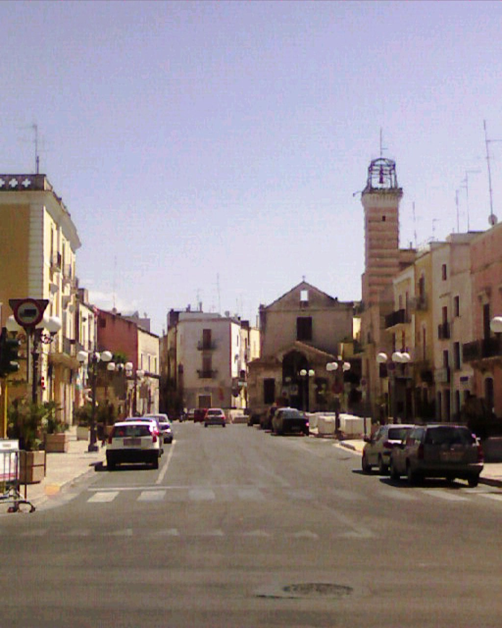 piazza sedile - Modugno (bari)-Italy